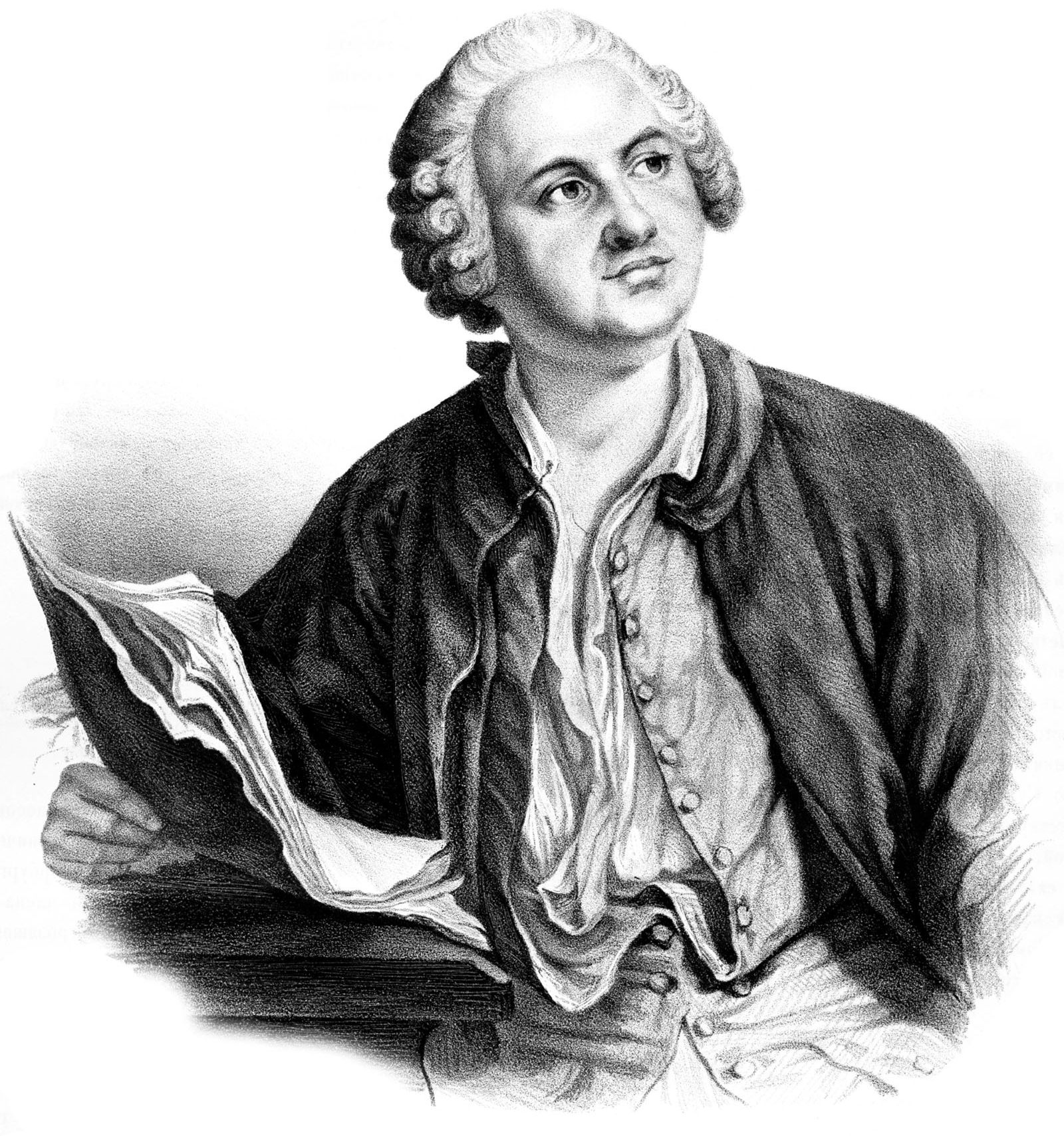 MICHEL LOMONOSSOV. Съ гравюры N.N. Лит. А. Мюнстера, СПБ. Imp. Lith. A. Munster (Editeur)